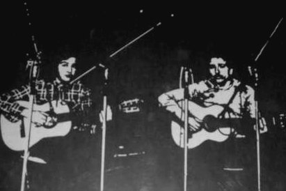 Vivencia. Dúo de rock argentino (1972-1983): Eduardo Fazio y Héctor Ayala